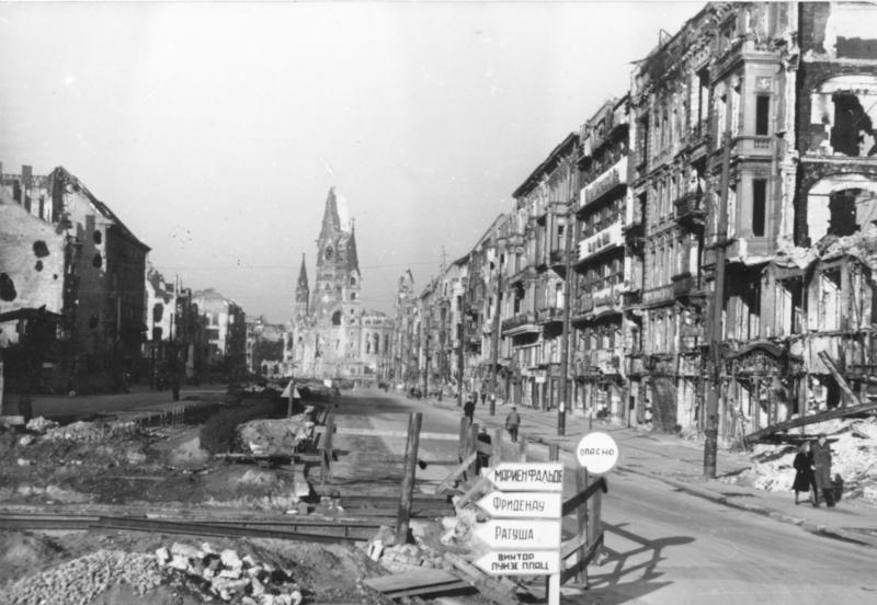 ADN-ZB/Donath Berlin Blick von der Tauentzienstraße auf die im II. Weltkrieg zerstörte Kaiser-Wilhelm-Gedächtniskirche am Auguste-Viktoria-Platz (umbenannt in Breitscheidplatz, Westberlin). Aufn. 1945